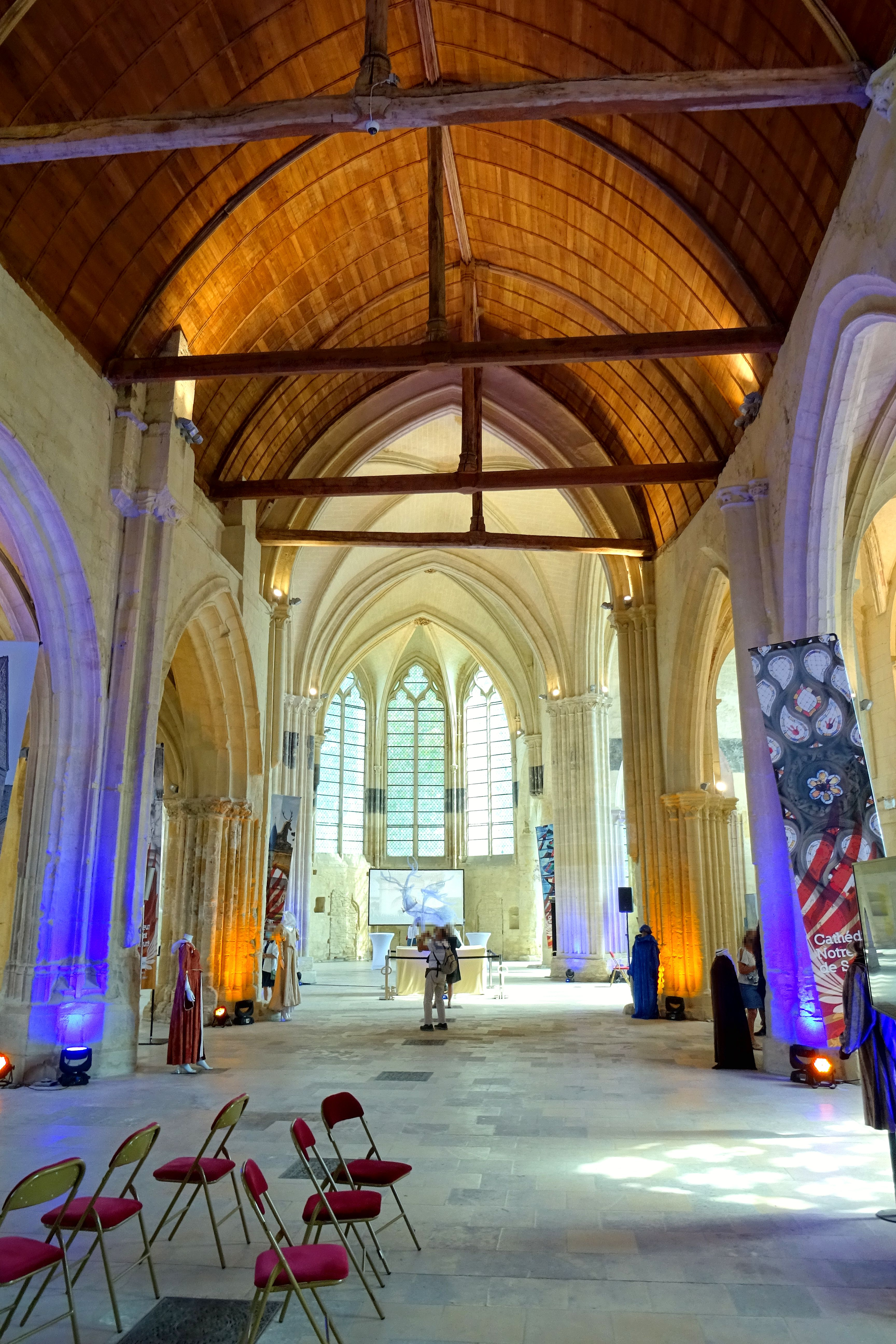 Intérieur de l'église - voir titre.